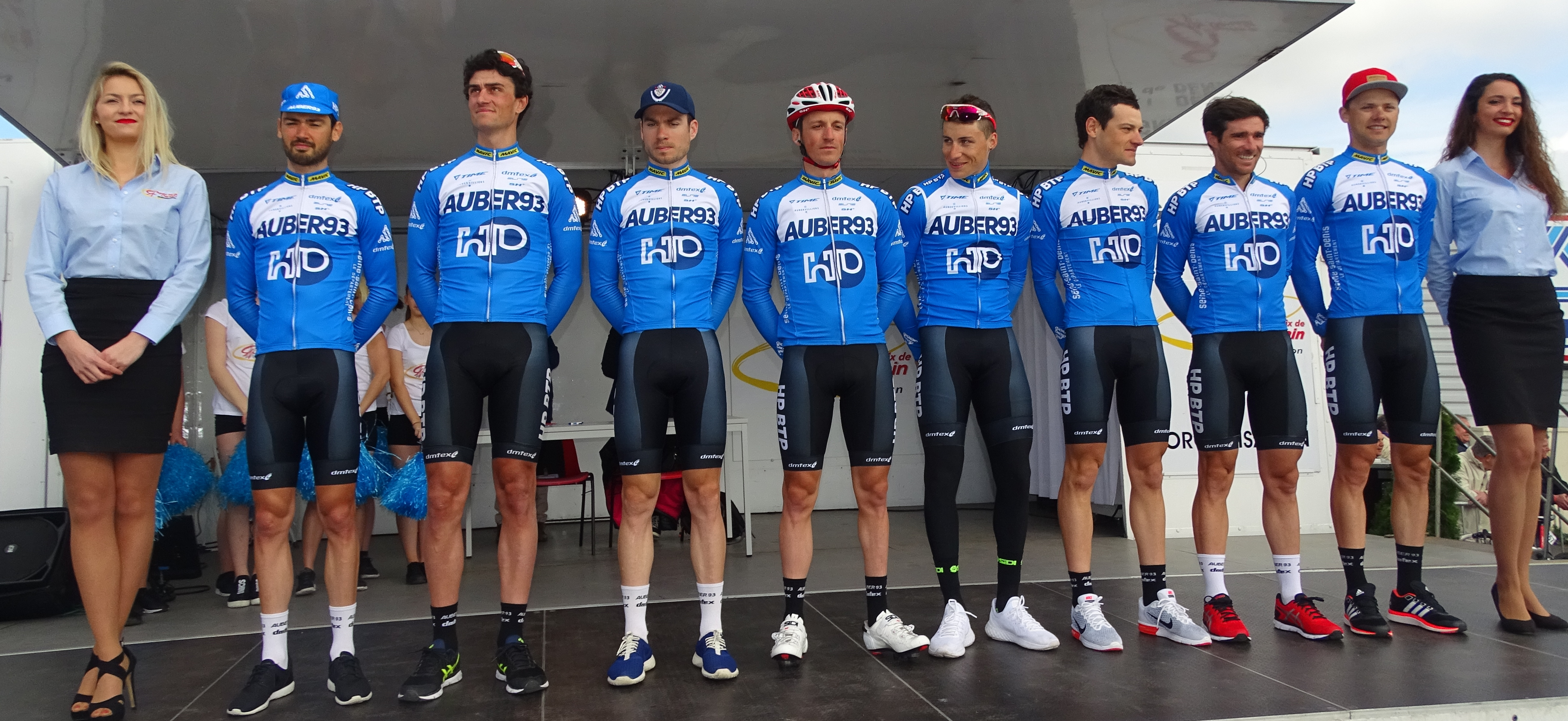 Reportage réalisé le jeudi 13 avril à l'occasion du départ et de l'arrivée du Grand Prix de Denain 2017 à Denain, Nord, Nord-Pas-de-Calais-Picardie, France.